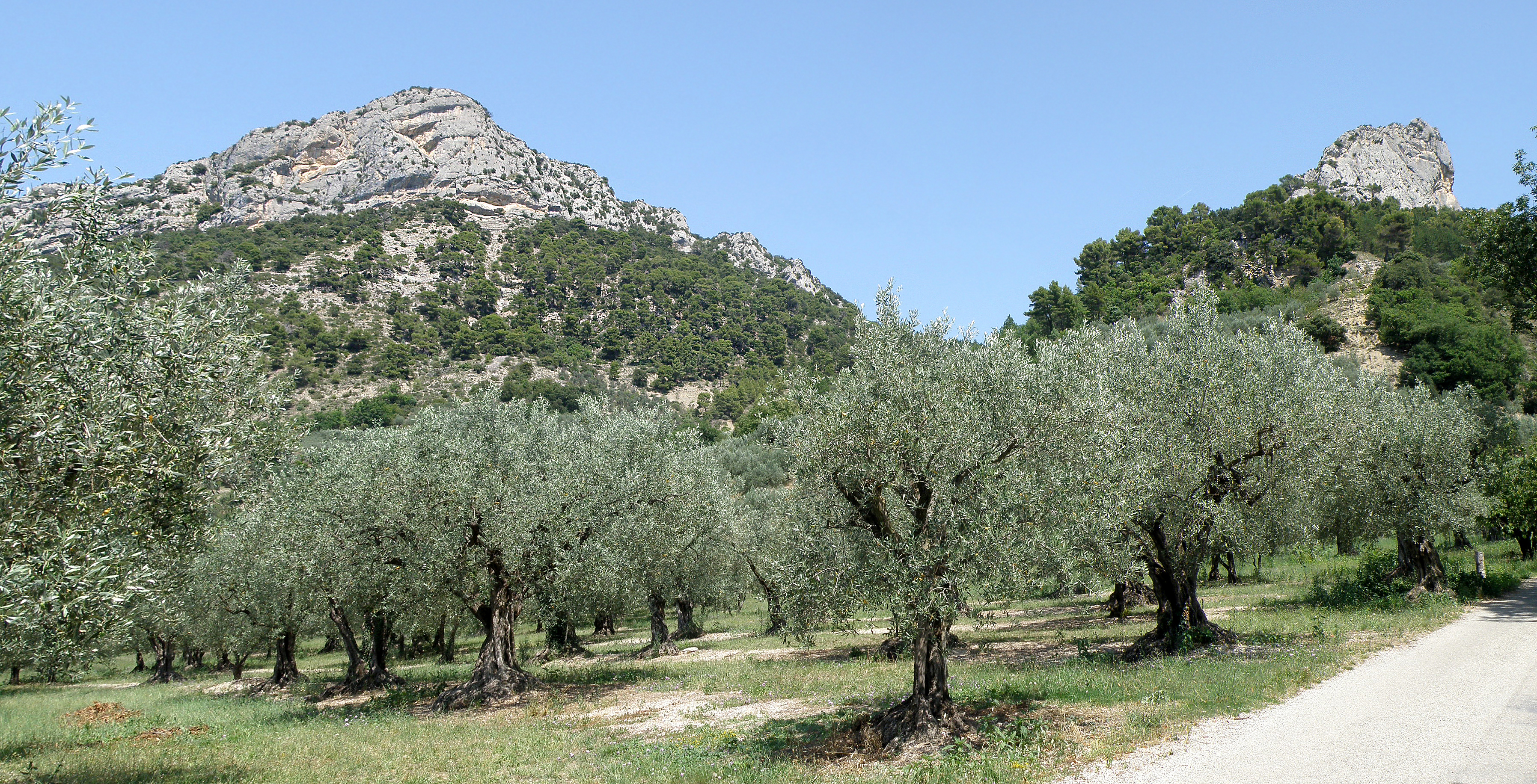 Buis-les-Baronnies (Drôme, France). Rocher d’Ubrieux (à gauche) et rocher de l'Aiguille (à droite).